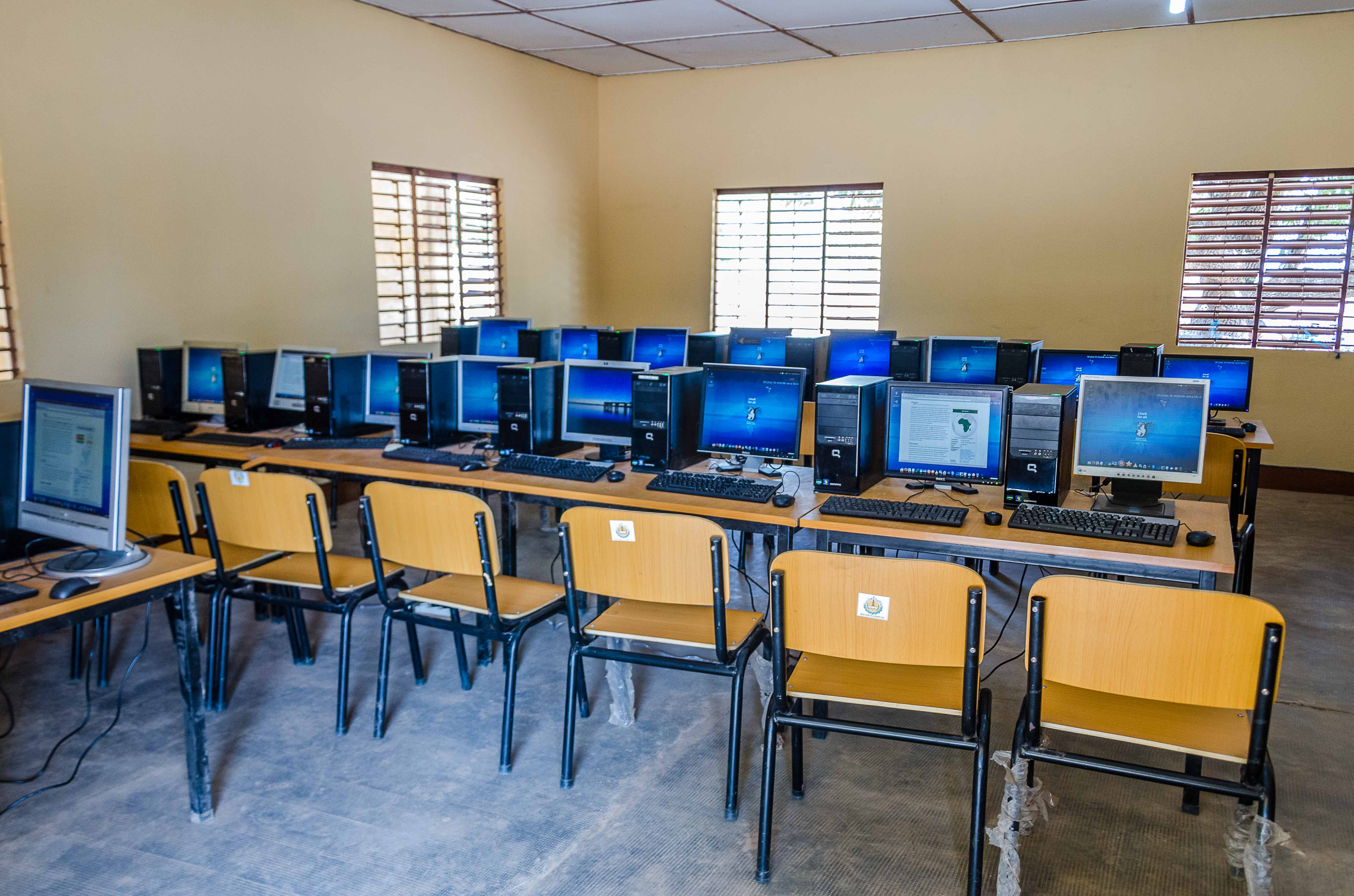 Salle informatique réalisée au sein du lycée de Cinkassé, région des savanes au nord Togo